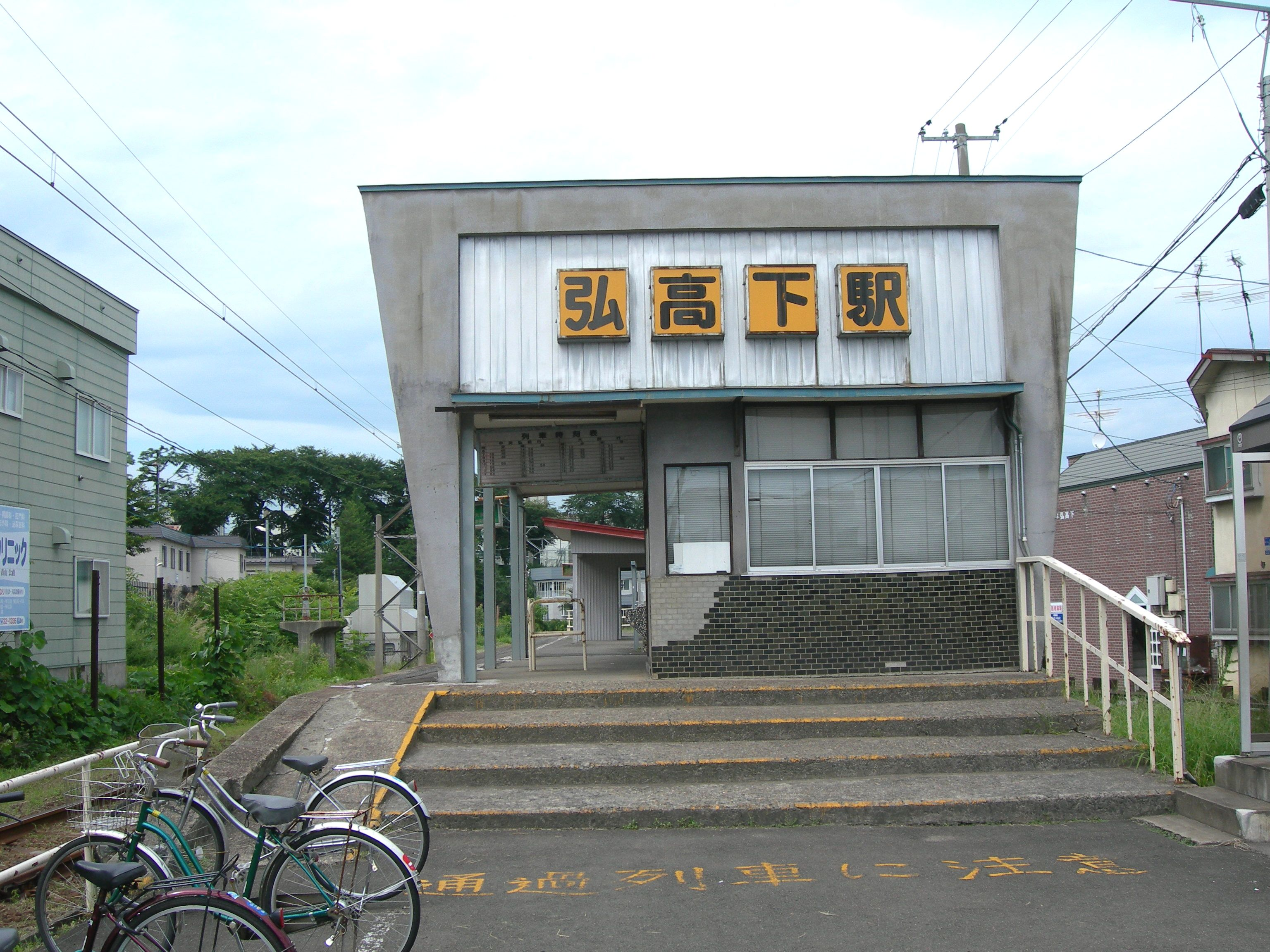 弘南鉄道弘高下駅